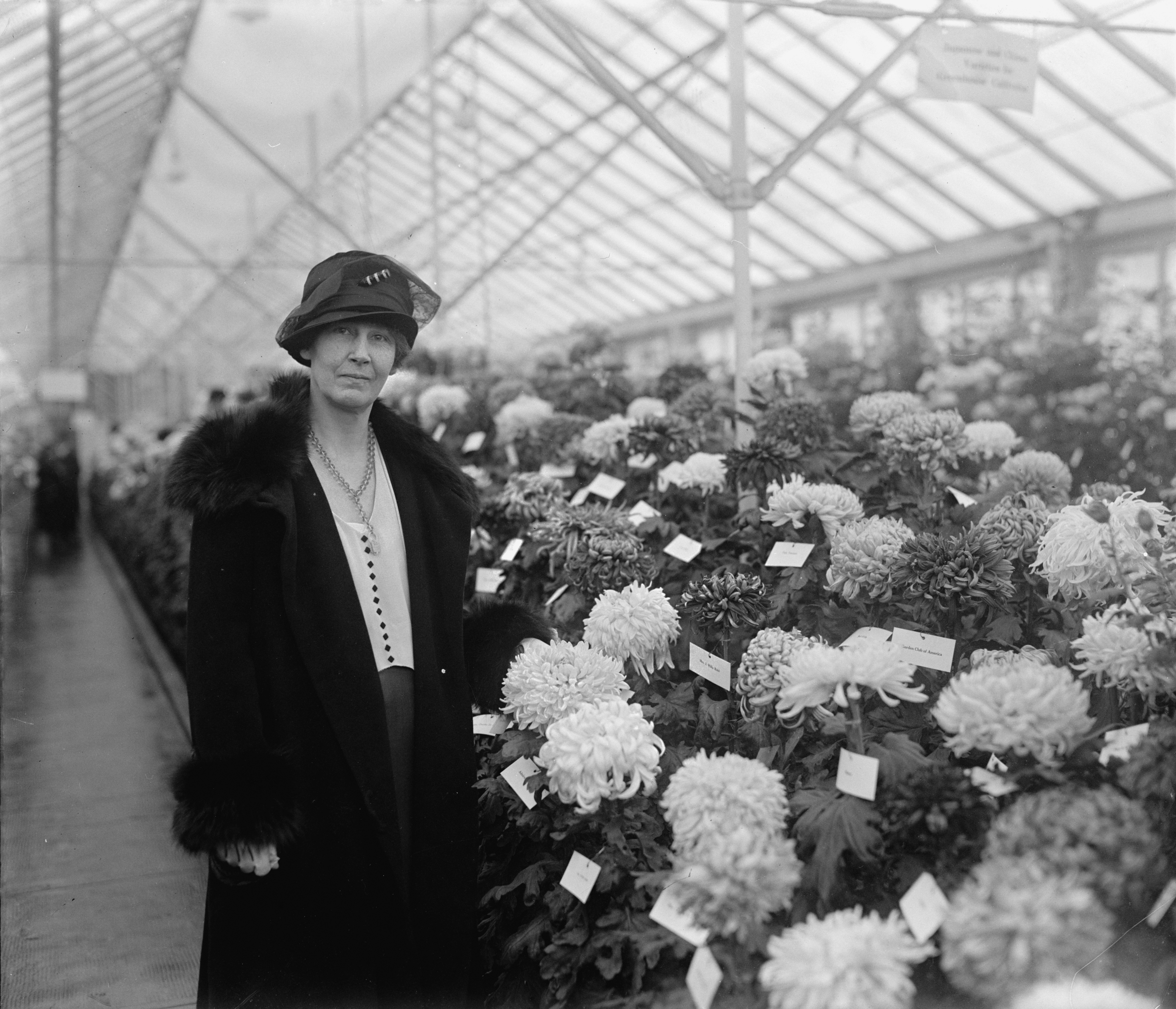 Mrs. Wm. M. Jardine, 11/5/25